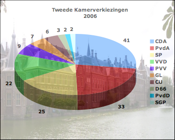 Uitslag Tweede Kamerverkiezingen 2006 vertaald in zetels